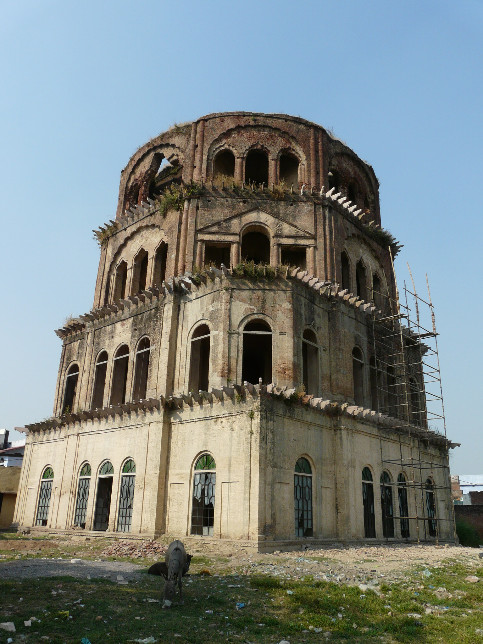 Satkhanda